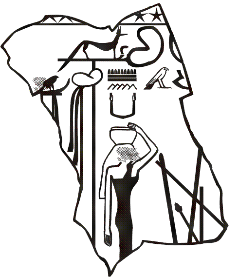 Relief mit der Darstellung der Königin(?) Menka